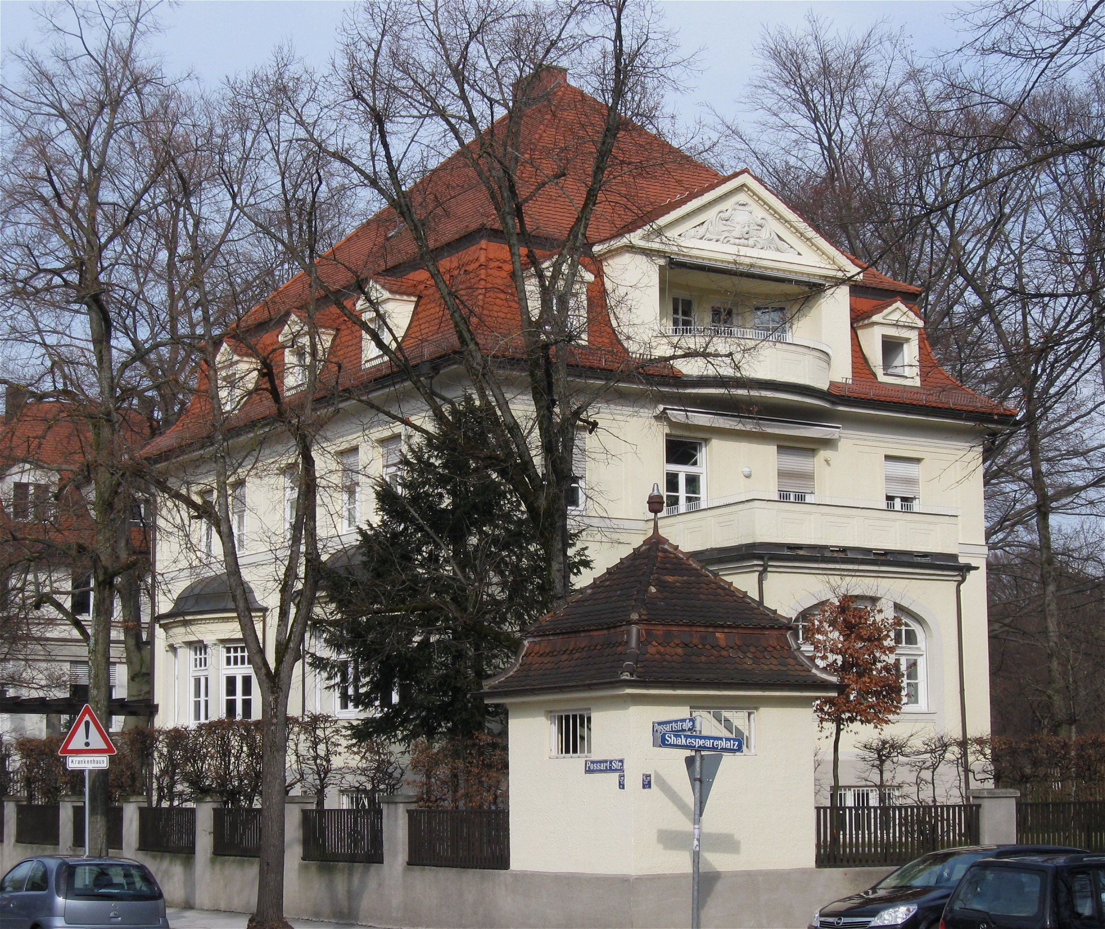 Possartstraße 18; Mansarddachvilla in Ecklage am Shakespeareplatz, neuklassizistisch, um 1910; samt zwei Gartenpavillons.